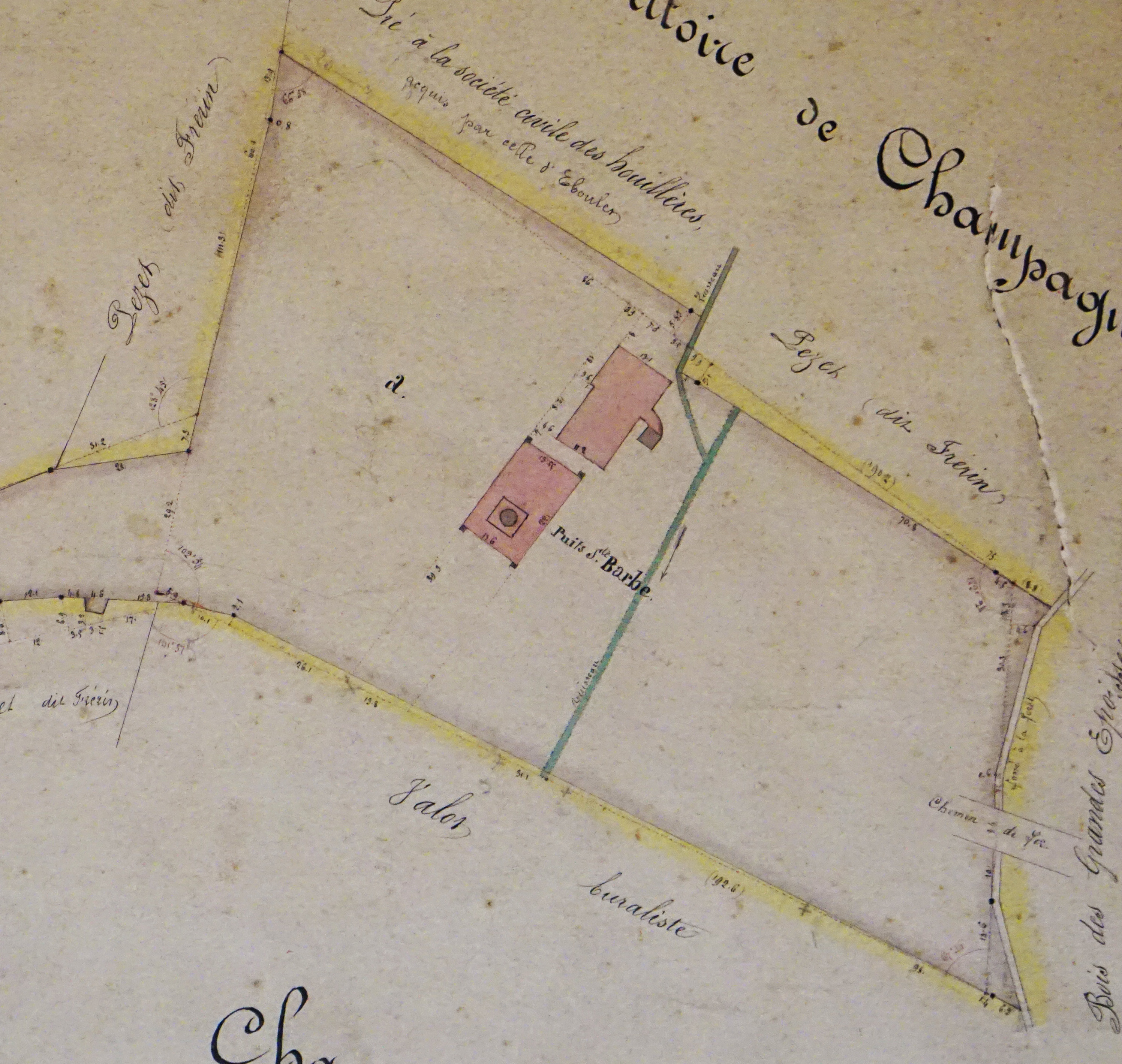 Plan du puits Sainte-Barbe des mines de Ronchamp.